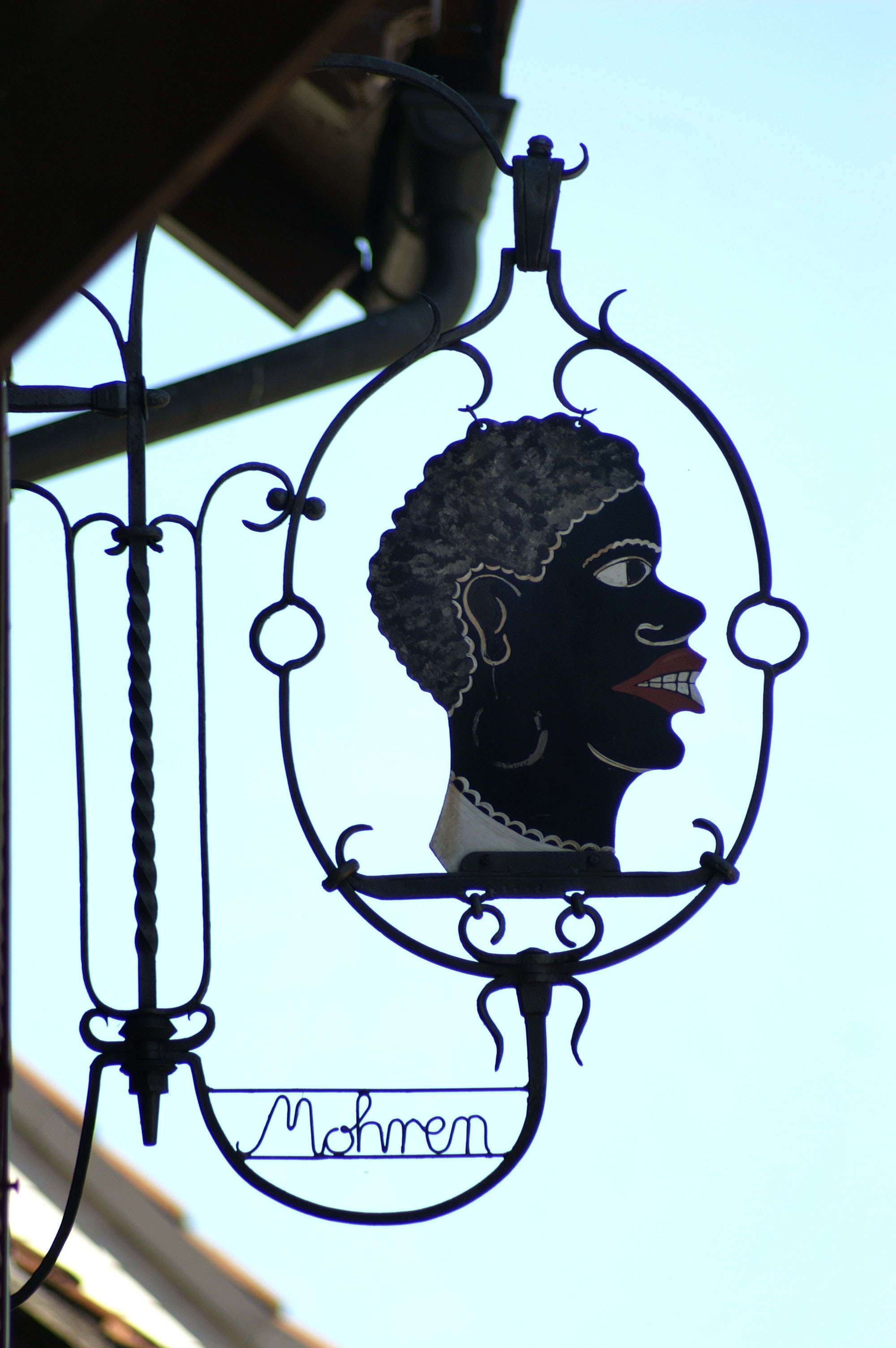 Gasthausschild Mohren im Dornbirner Hatlerdorf, Hanggasse 31. Ein traditionsreiches Gasthaus war das Schiffle in der Hanggasse. Der Wirt Franz Xaver Mohr stammte aus dem Oberdorf und hieß im Volksmund „Mohro Vere“. Da ein Schiffle sowieso nicht in die trockene Hanggasse passt, so wenig wie heute nach Mühlebach, hat man das Haus erst im Volksmund und dann amtlich in Mohren umgetauft.